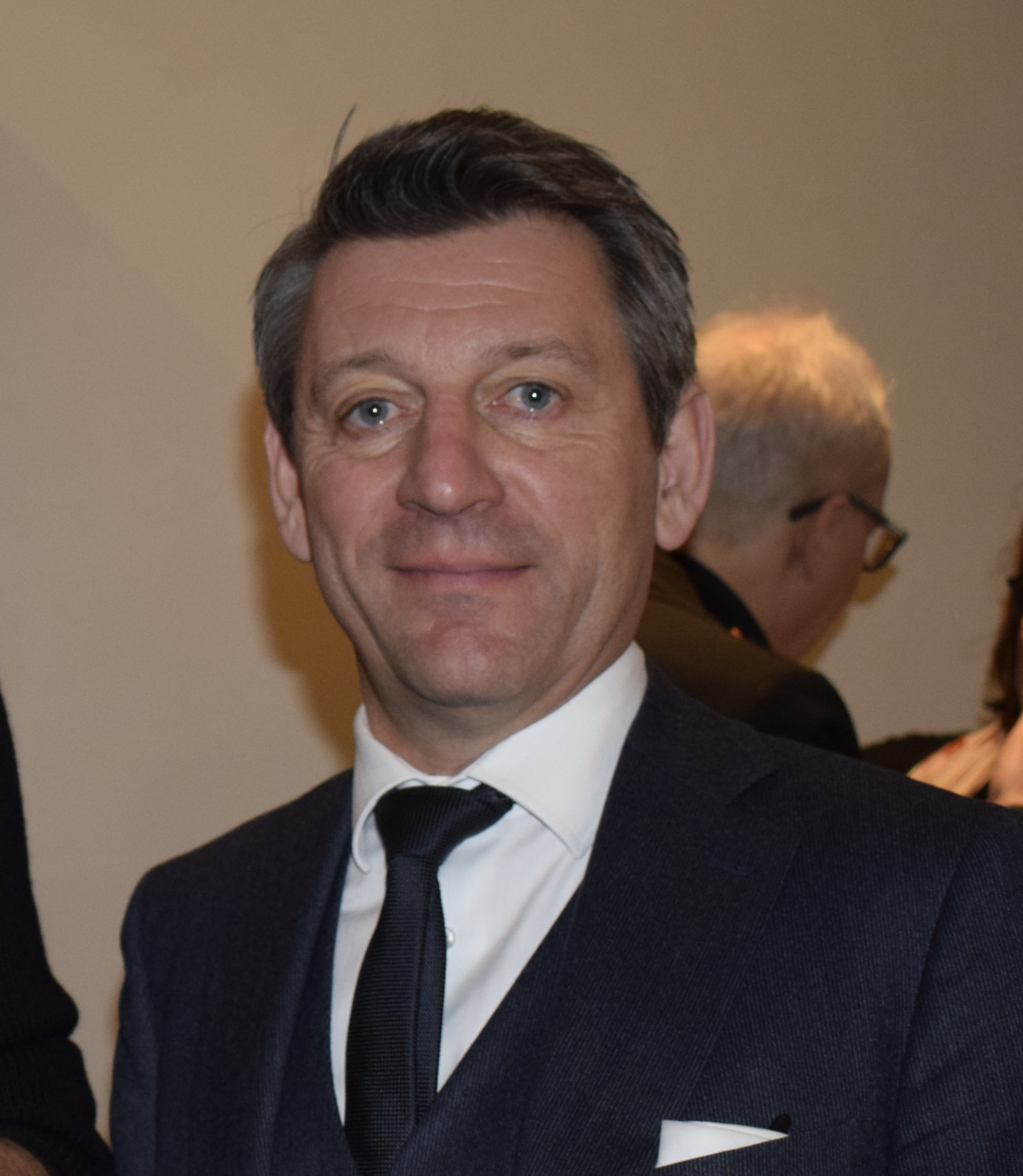 10.02.2019: Berlinale-Empfang an der Österreichischen Botschaft Berlin - crop von File:10.02.2019 Berlinale-Empfang an der Österreichischen Botschaft Berlin (46348985074).jpg